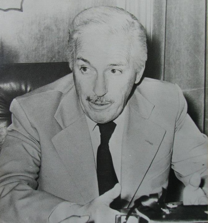 Fernando Difonzo es un ex militar argentino, perteneciente a la Armada Argentina, que alcanzó la jeraquía de Capitán de Navío. Ocupó el cargo de interventor federal y Gobernador de facto de Misiones, del 1 de noviembre de 1978 al 6 de diciembre de 1978, durante la presidencia de facto de Jorge Rafael Videla durante el Proceso de Reorganización Nacional.